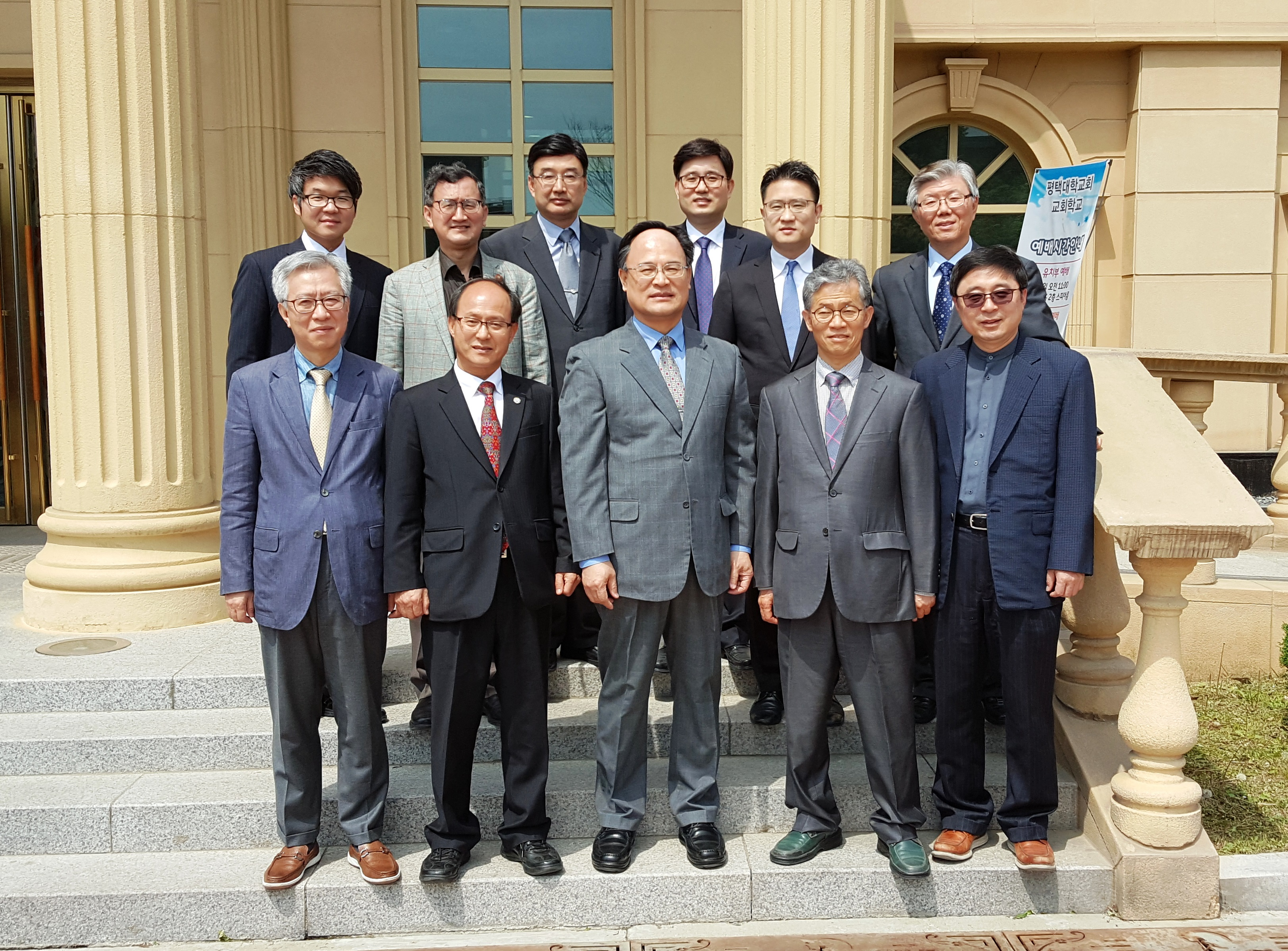 평택대학교 피어선신학전문대학원 신학과교수들 100주년기념탑에서 2016년 5월 2일